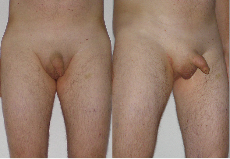 Unterentwickeltes Geschlecht eines Mannes. Das Hodenvolumen beträgt lediglich 8ml, das Skrotum ist nur gering ausgeprägt, kindlicher Penis. Der Pubertätsentwicklungsstand entspricht ungefähr dem eines 12-13 jährigen Jungen.